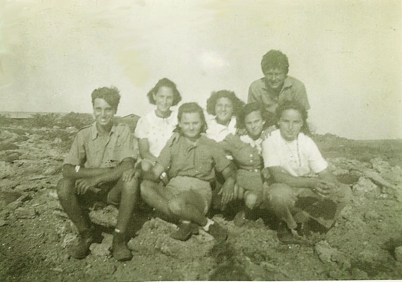 נוער הכפר אביחיל מנחם עומד מימין.